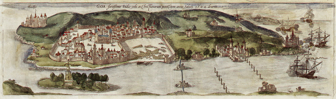 Goa